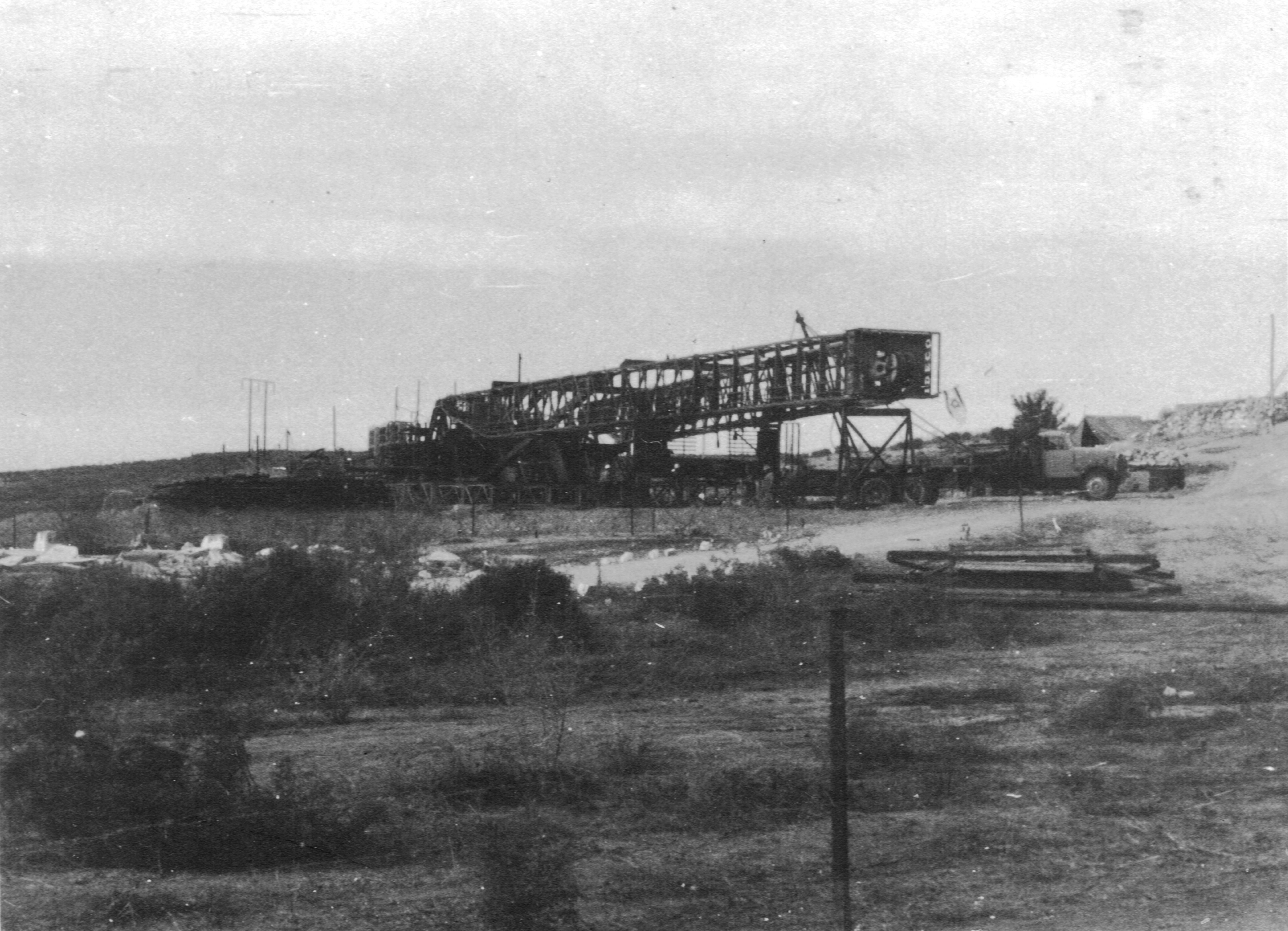 The Heletz oil field was the location of the first successful oil well in Israel, with extraction beginning in 1955 resulting in much celebration. שדה הנפט חלץ היה קידוח הנפט הראשון שהצליח במדינת ישראל. הנפט פרץ מהקידוח ב-1955 והיווה סיבה לחגיגות ולכתיבת שירים במדינה הצעירה.